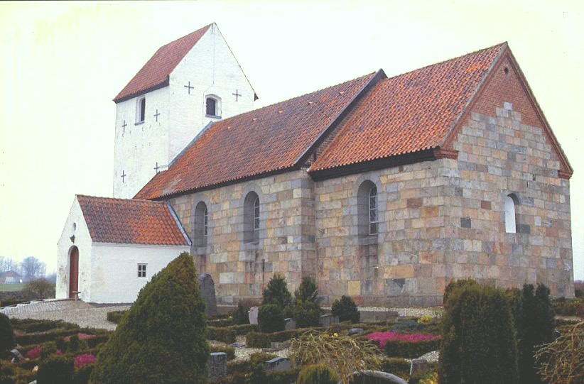 Gødvad Kirke, set fra sydøst; Silkeborg Kommune, Denmark